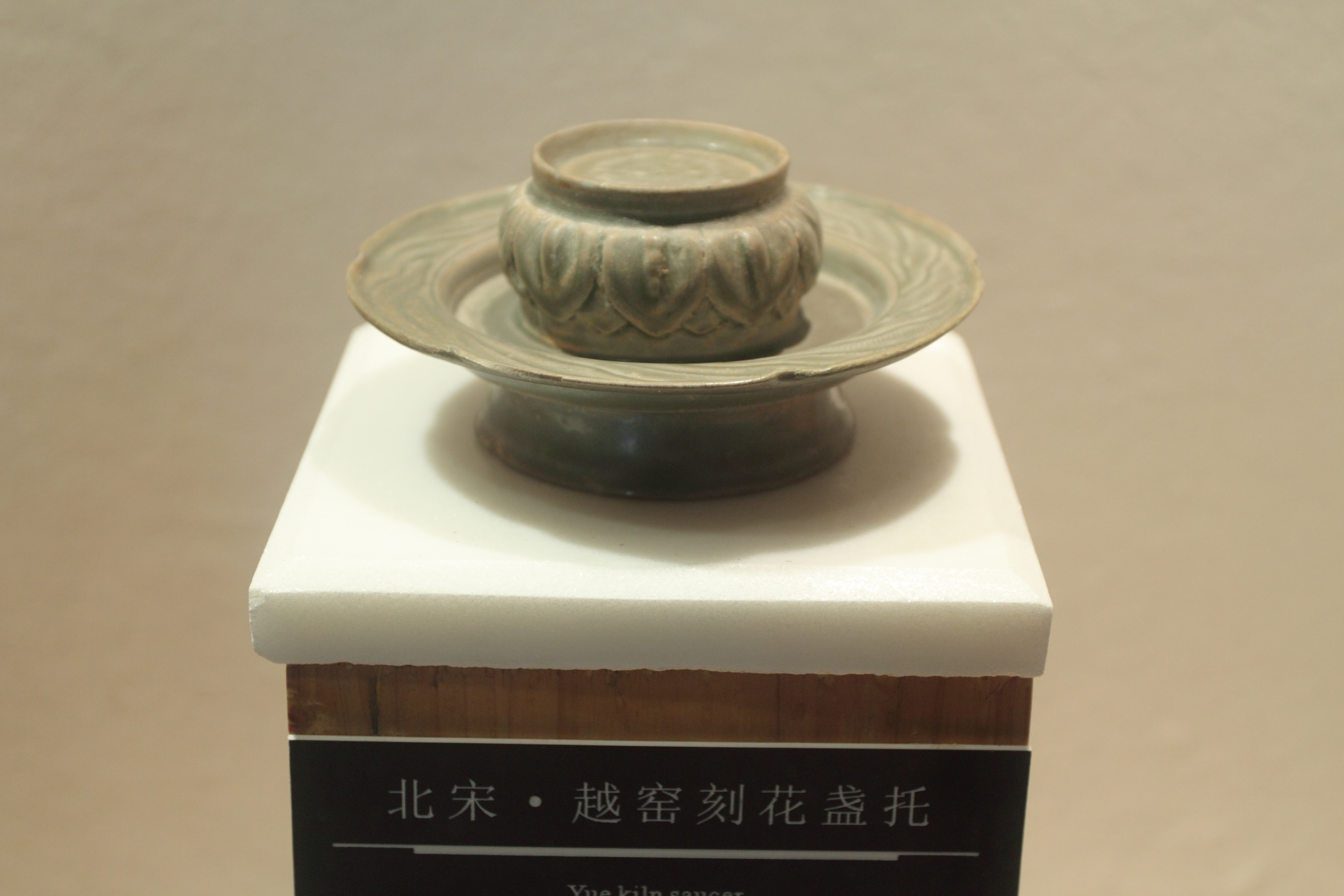 杭州南宋官窑博物馆藏品——北宋越窑刻花盏托。